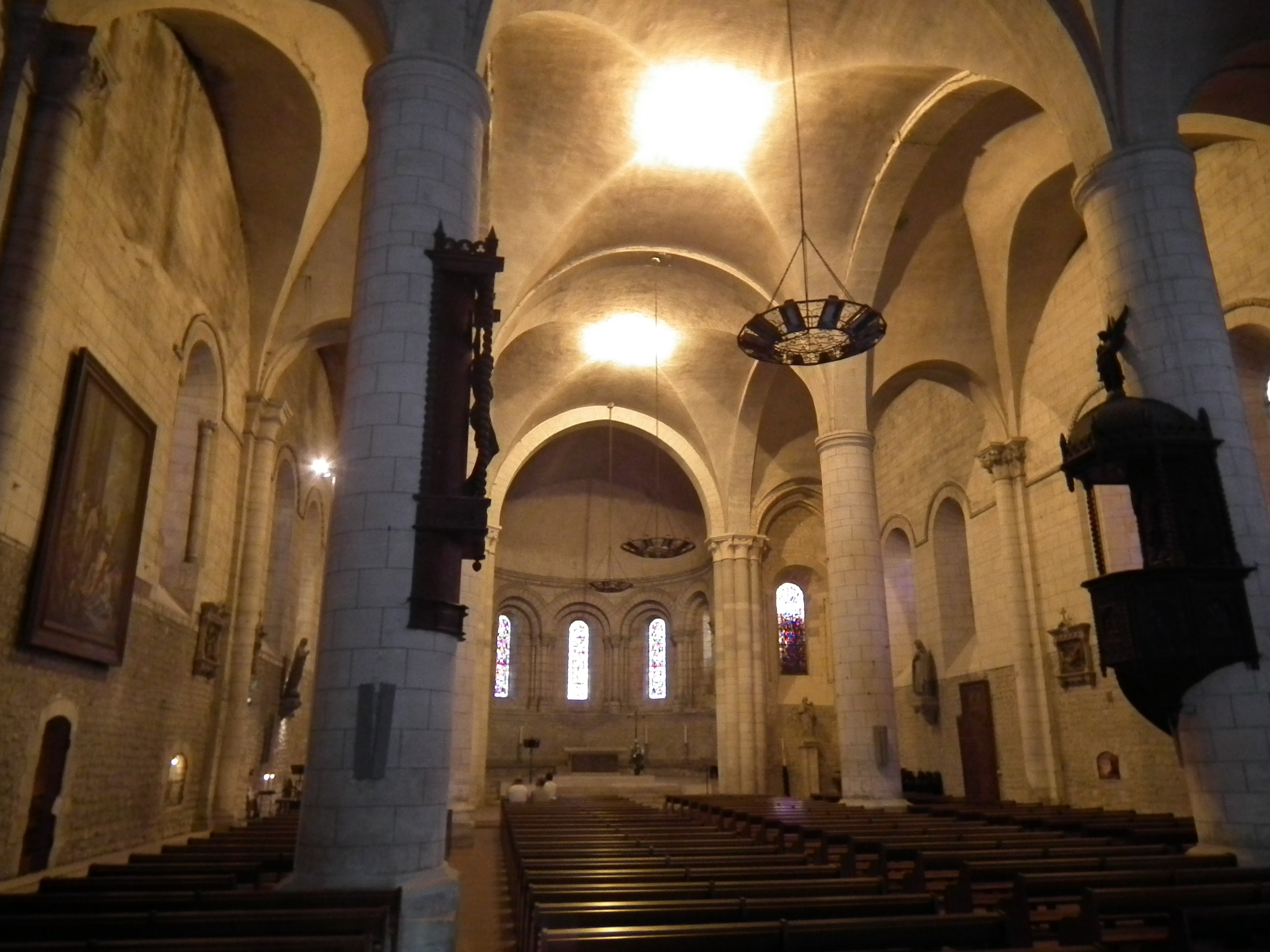 Intérieur de l'église de Barbezieux